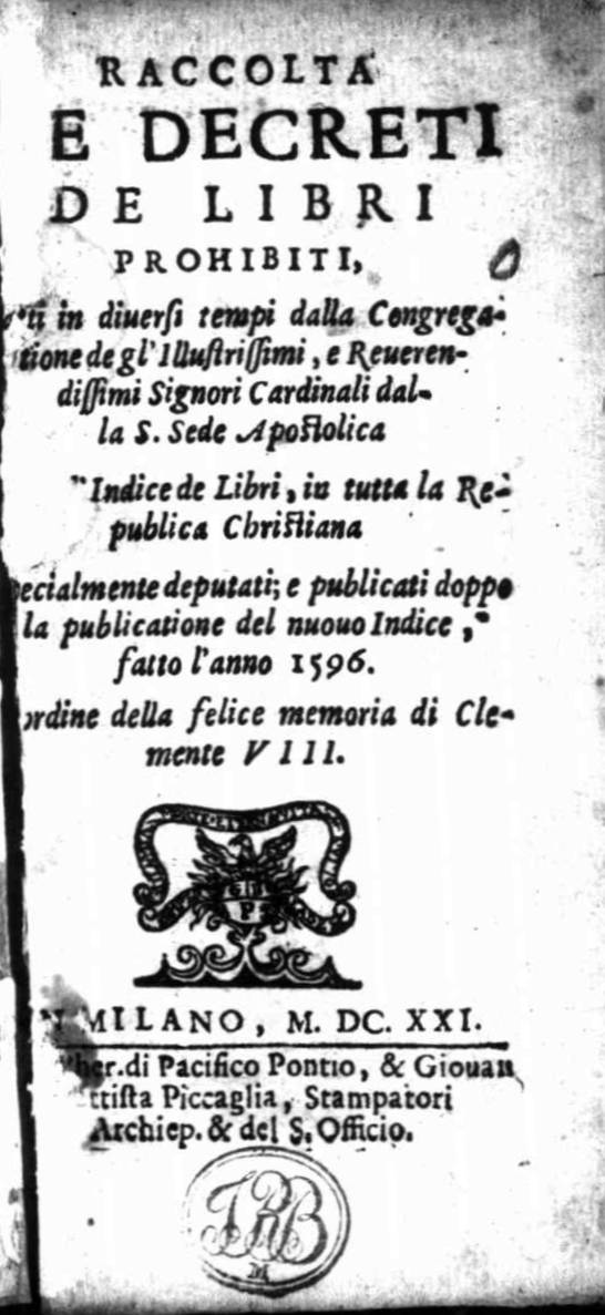 Frontespizio